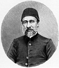 Mehmed Emin Aali Pasha 1815-1871